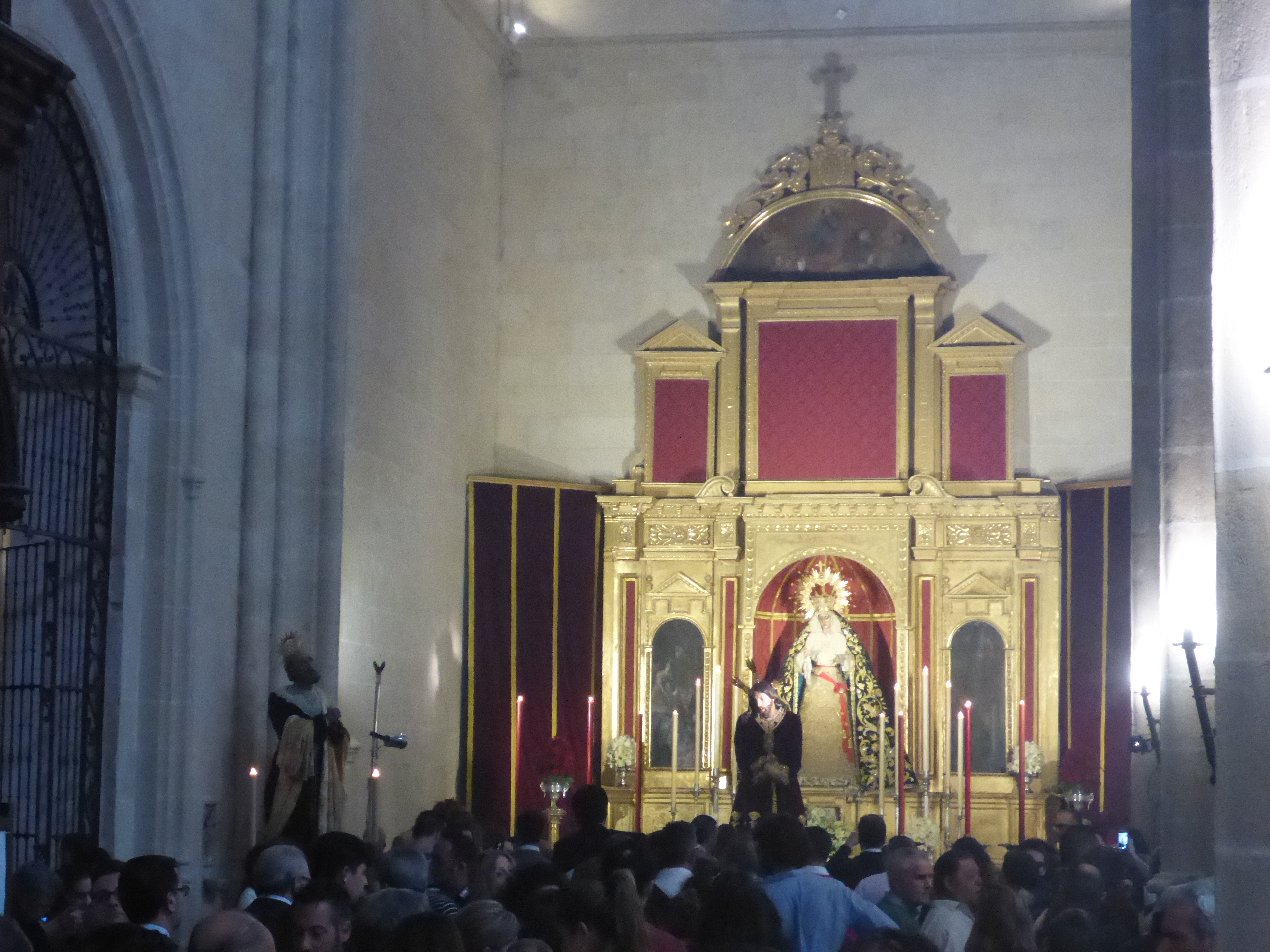 Cuaresma 2017 in Jerez de la Frontera